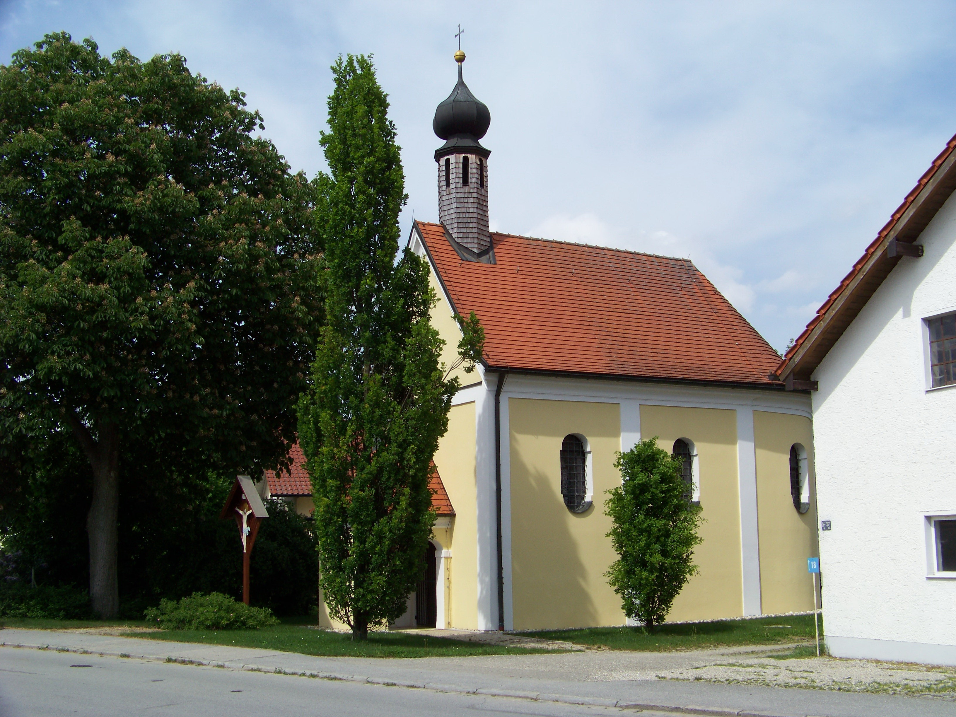 Wallersdorf, Haidlfing. Kapelle St. Antonius von Padua, kleiner Saalbau mit Dachreiter, erbaut 1702; mit Ausstattung.